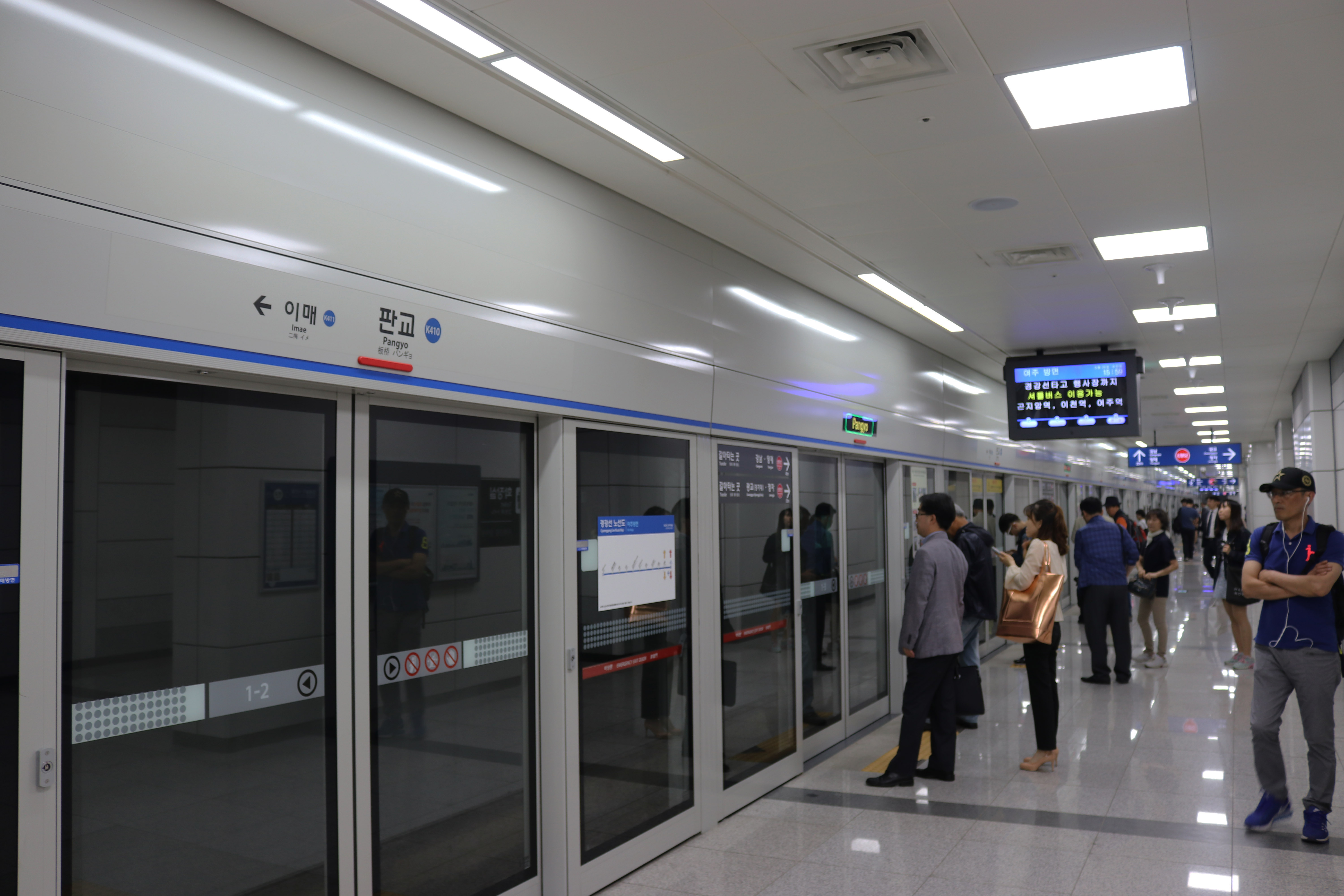 판교역 경강선 승강장